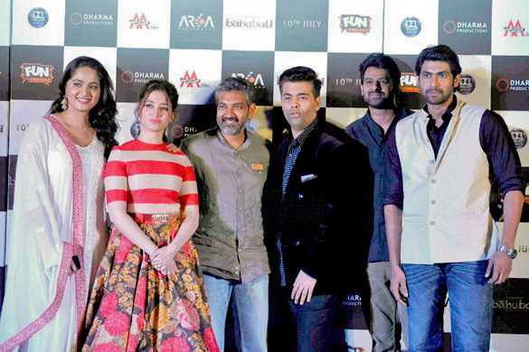 Anushka Shetty, Tamannaah Bhatia, S S Rajamouli, Karan Johar, Prabhas, Rana Daggubati at the trailer launch of the film 'Baahubali'